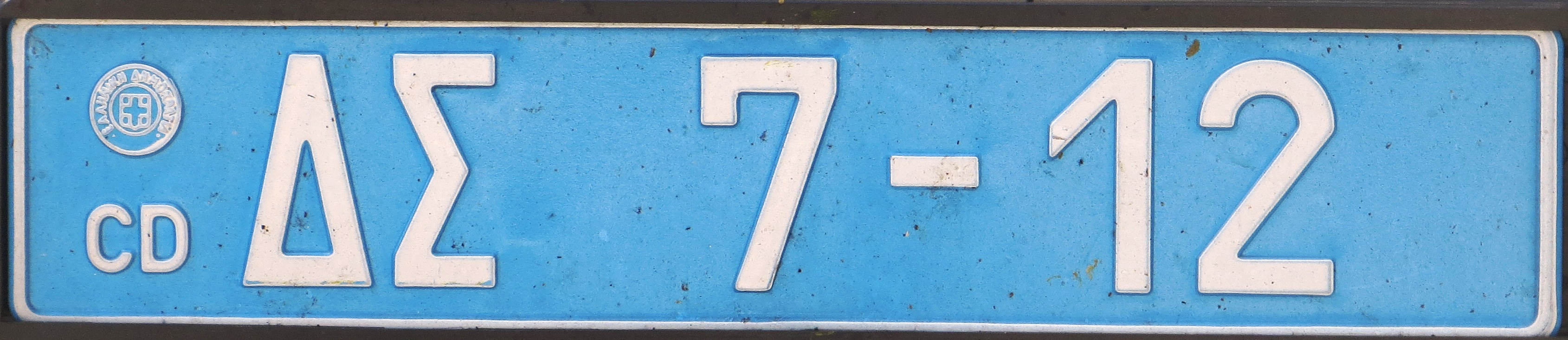 CD kentekenplaat Griekenland